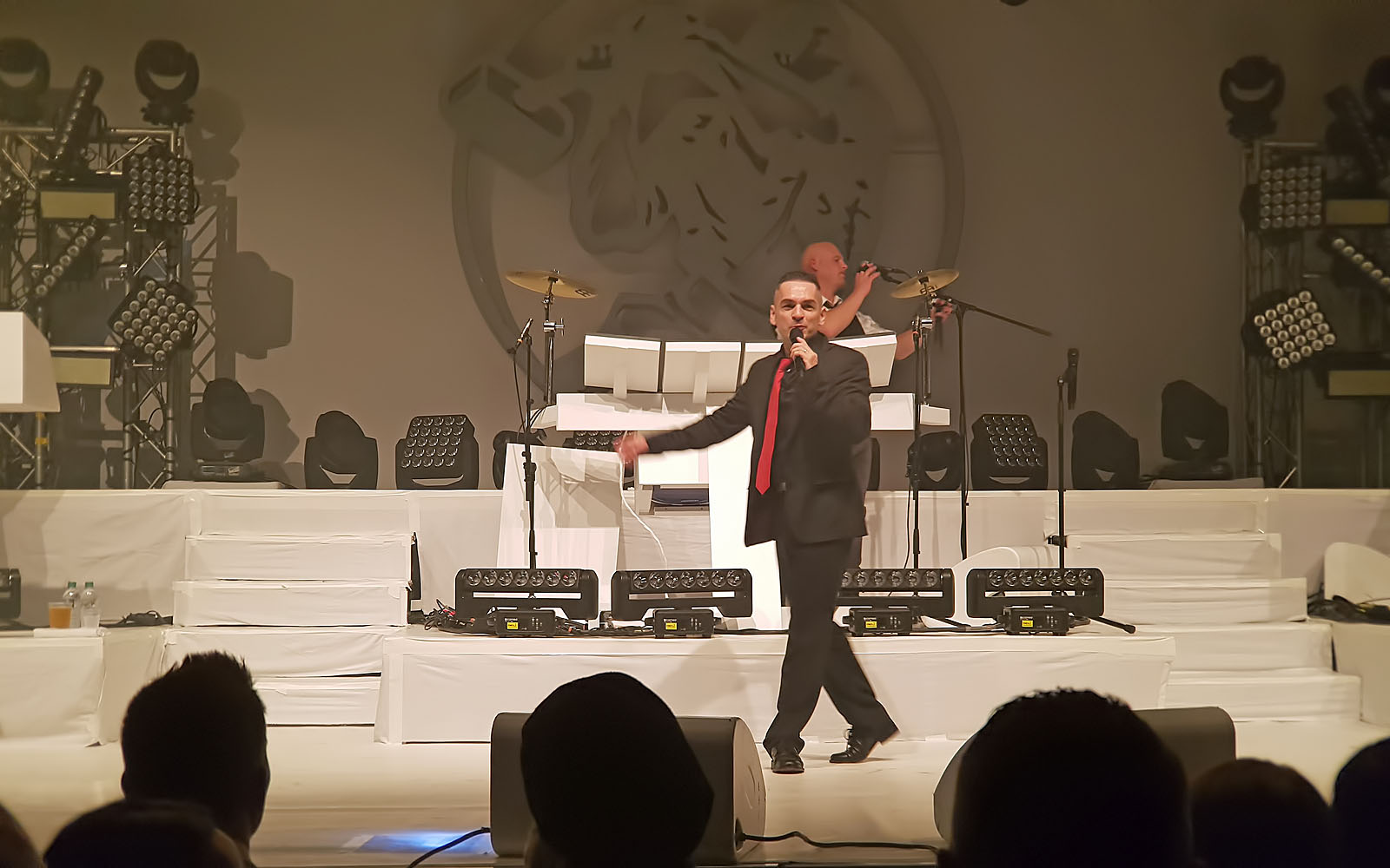 And One im Konzert am 07.10.2016 im Haus Auensee in Leipzig